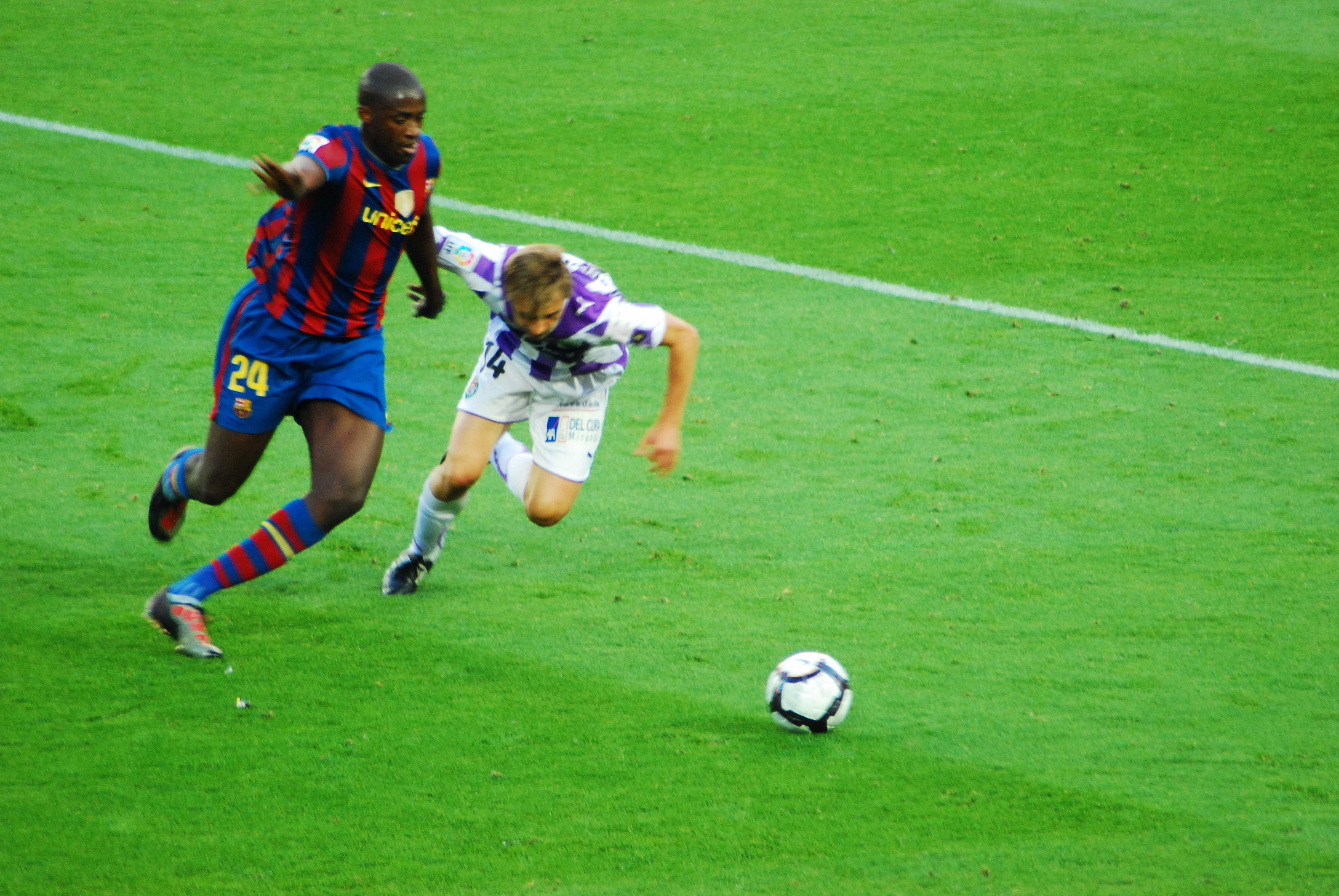 Touré Yaya disputa una pelota con un jugador del Real Valladolid.